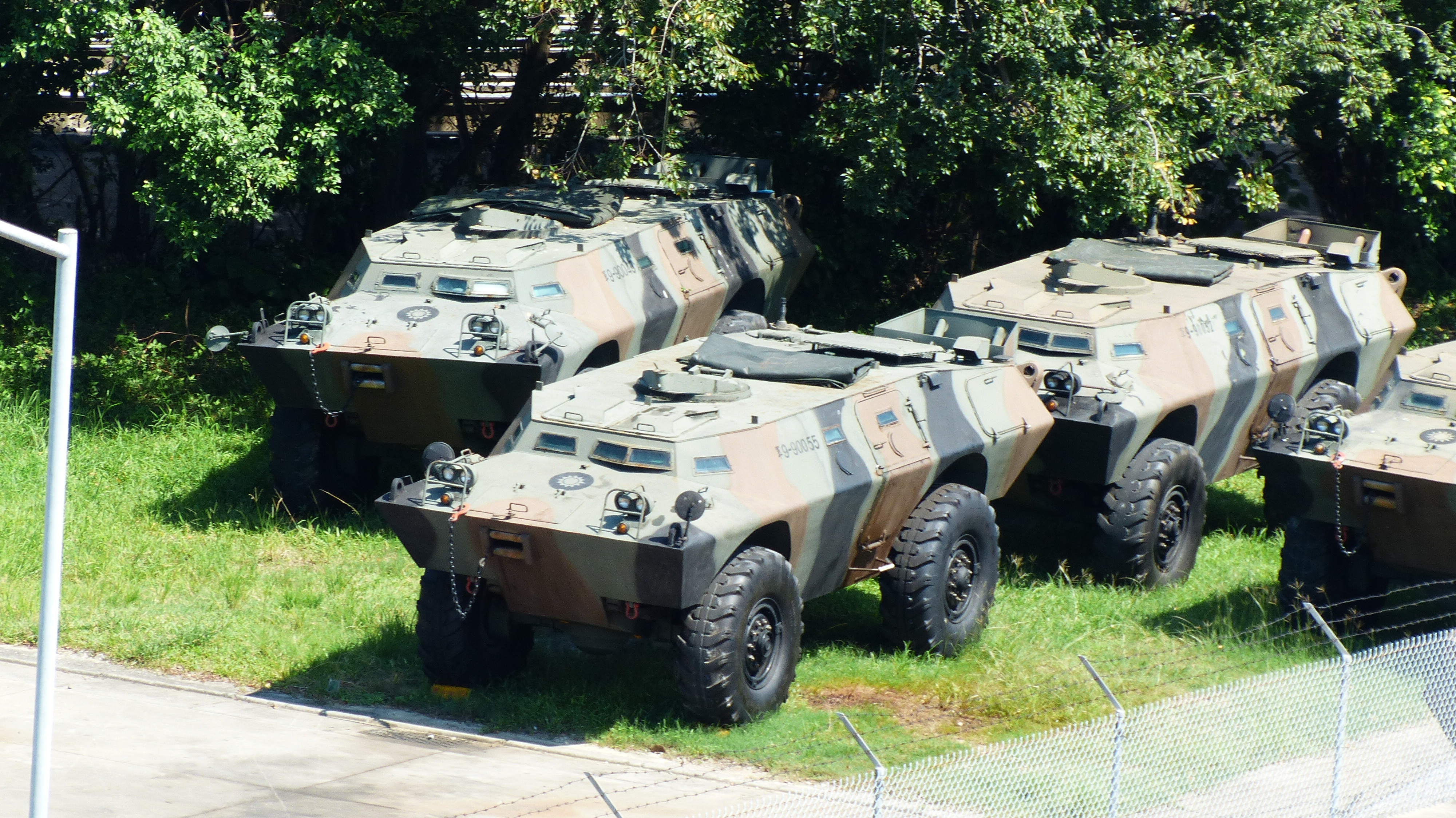 臺北市憲兵營區露天停放的V-150S裝甲車。